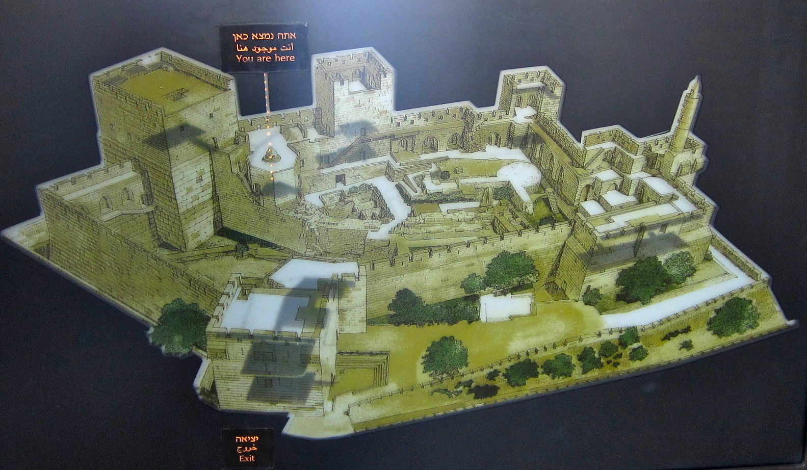 Citadel layout diagram Jerusalem